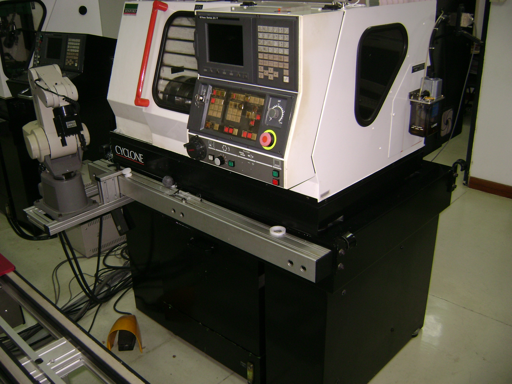 Máquinas operadas con el pie, parapermitir el uso de las manos y pies al mismo tiempo.